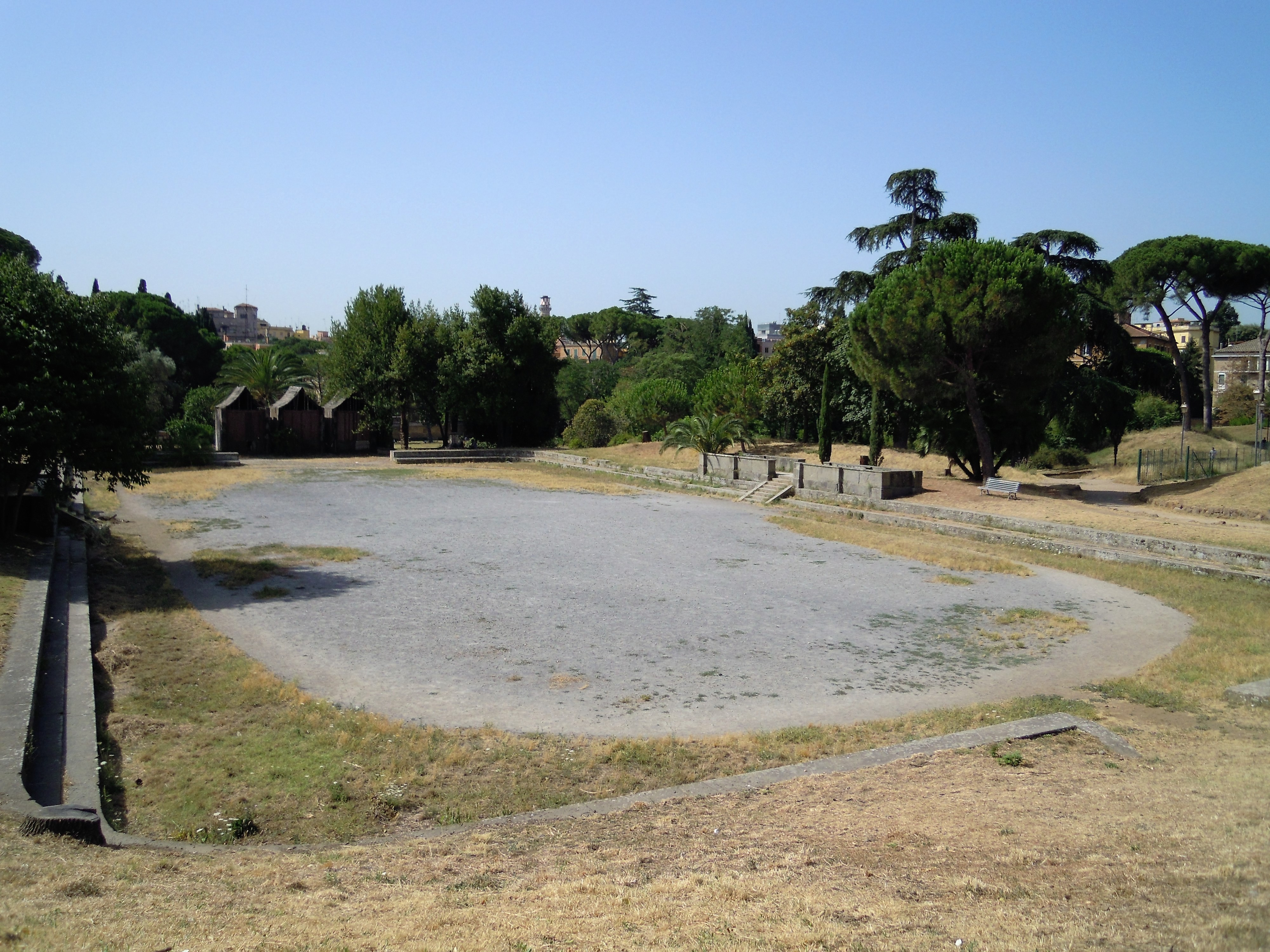 Roma, Villa Torlonia: campo da tornei con gradinate e tende (sullo sfondo)